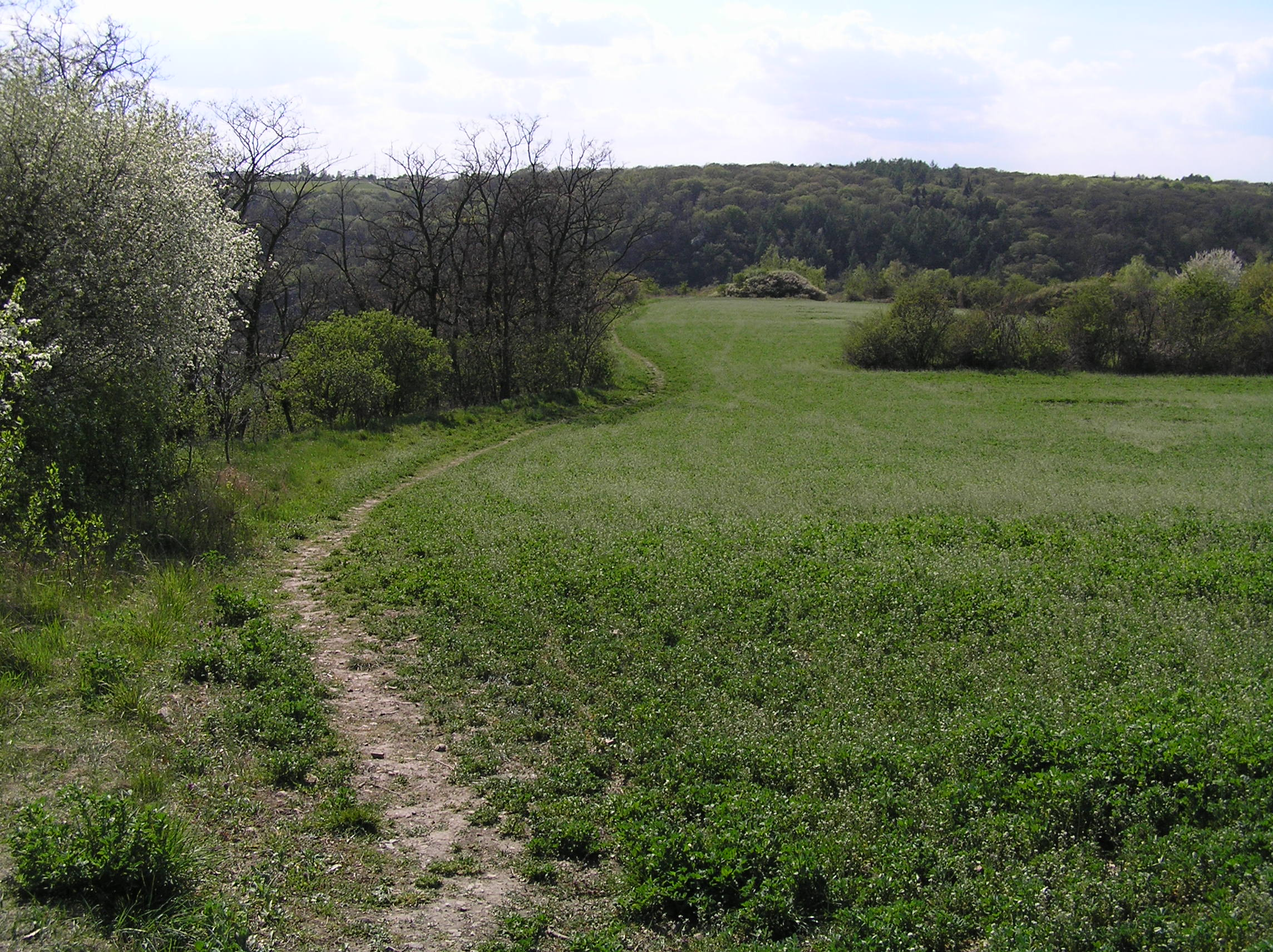 Hradiště Zámka, na ostrohu nad Vltavou, Zámky.